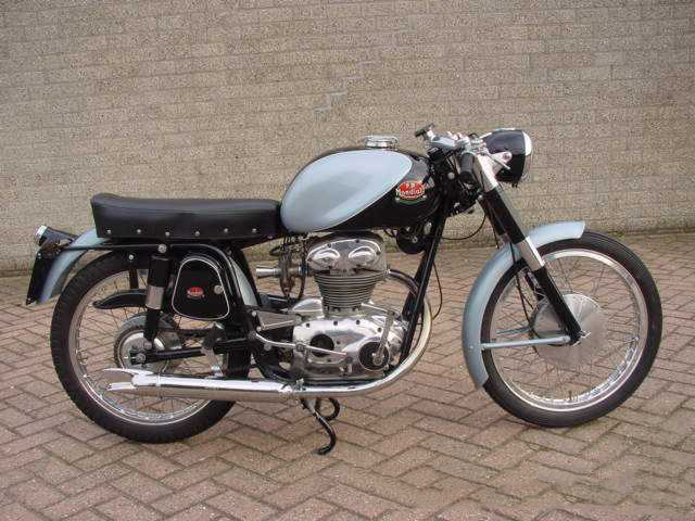 Toestemming van Yesterdays Antique Motorcycles